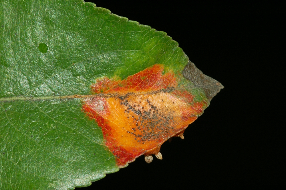 Gymnosporangium sabinae, Birnengitterrost, Frankfurt am Main, Nied, Deutschland, Germany